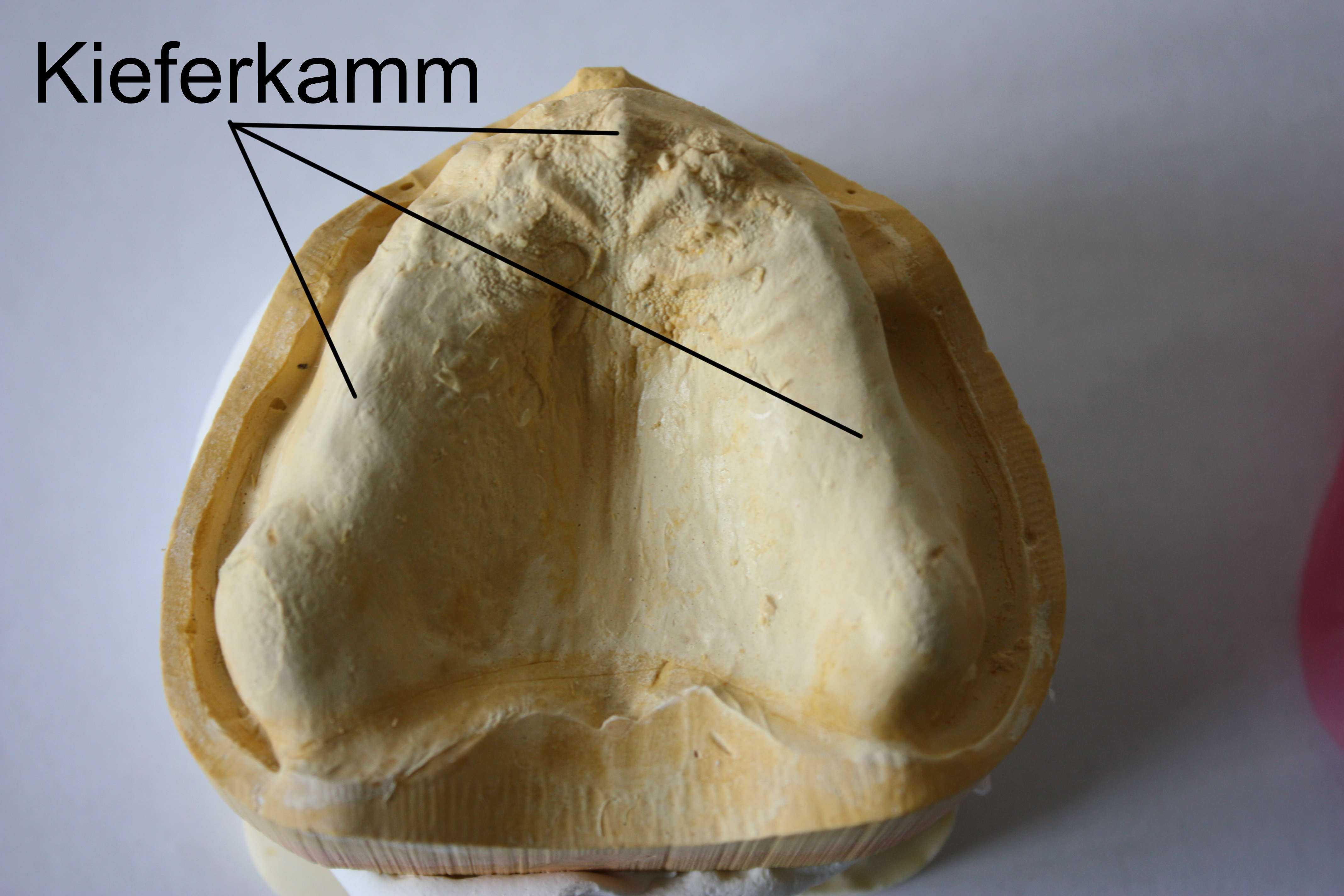 Beschreibung